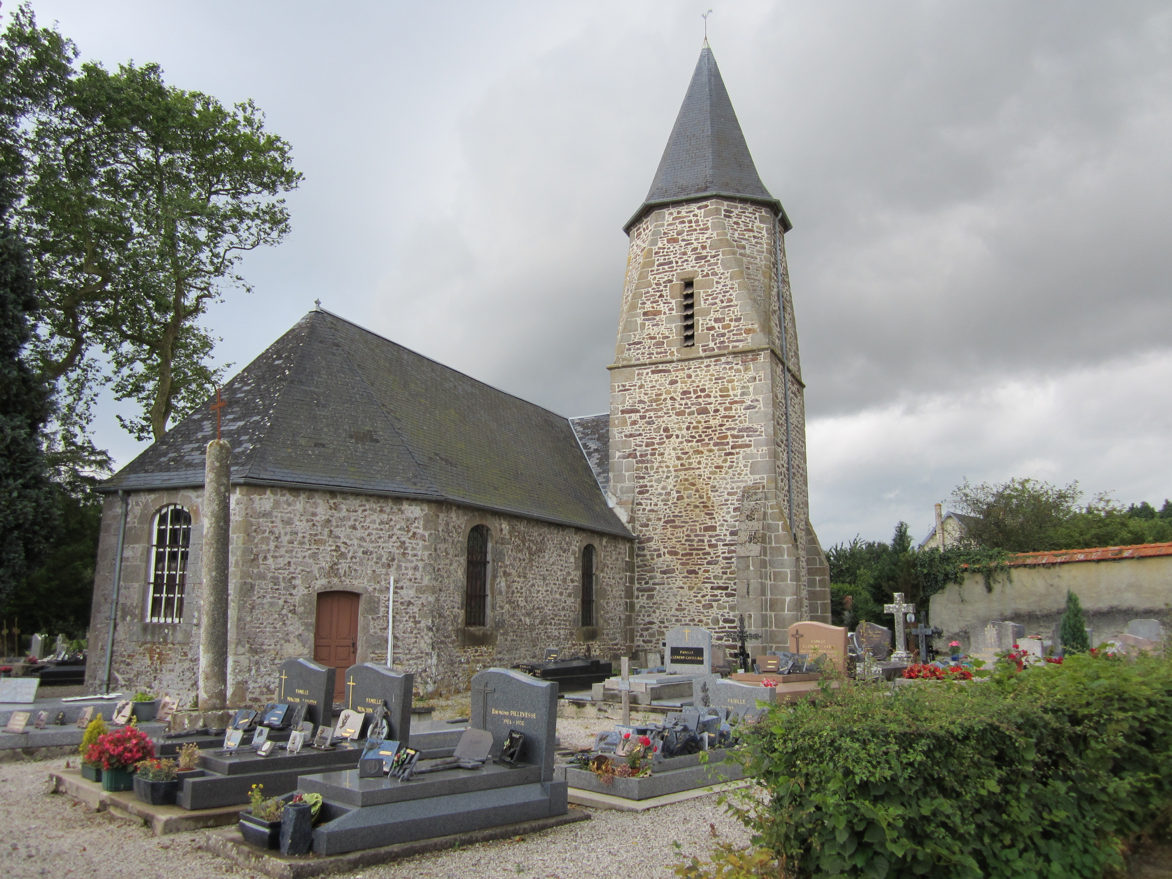 Église Saint-Pierre de Chanteloup (Manche)